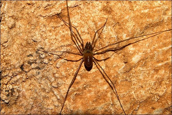 Sabacon paradoxum (Opilion) sur la paroi d'une grotte